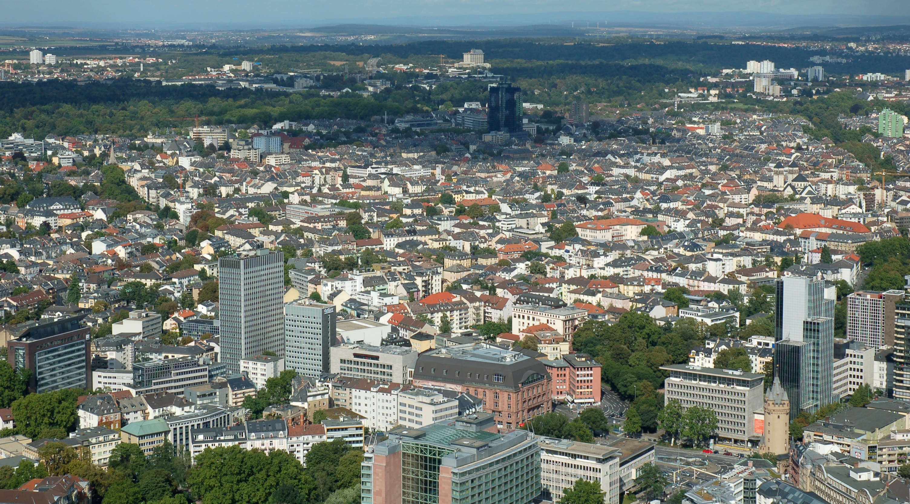 Blick auf das Frankfurter Nordend